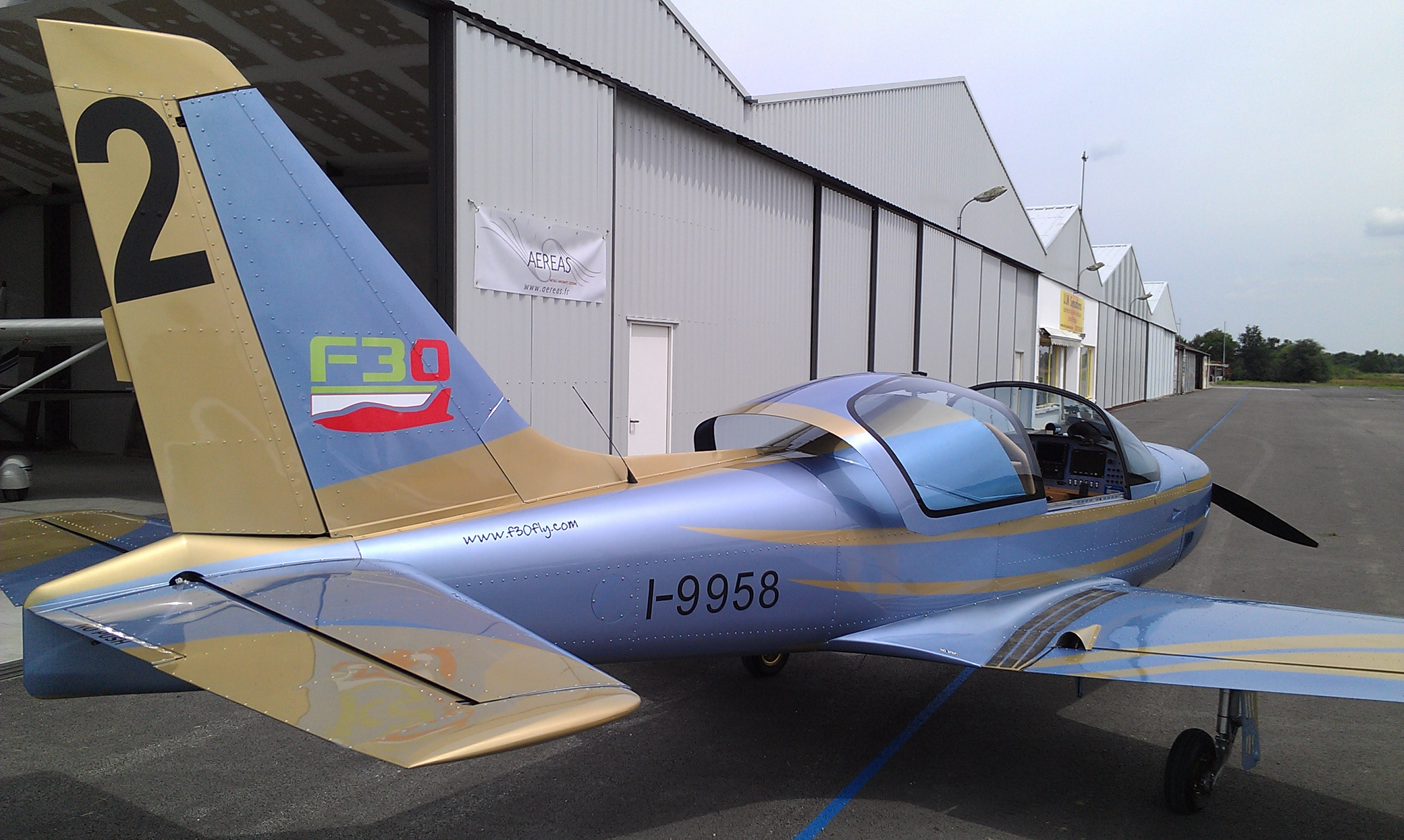 F30 RG Blue and Gold vue arrière gauche